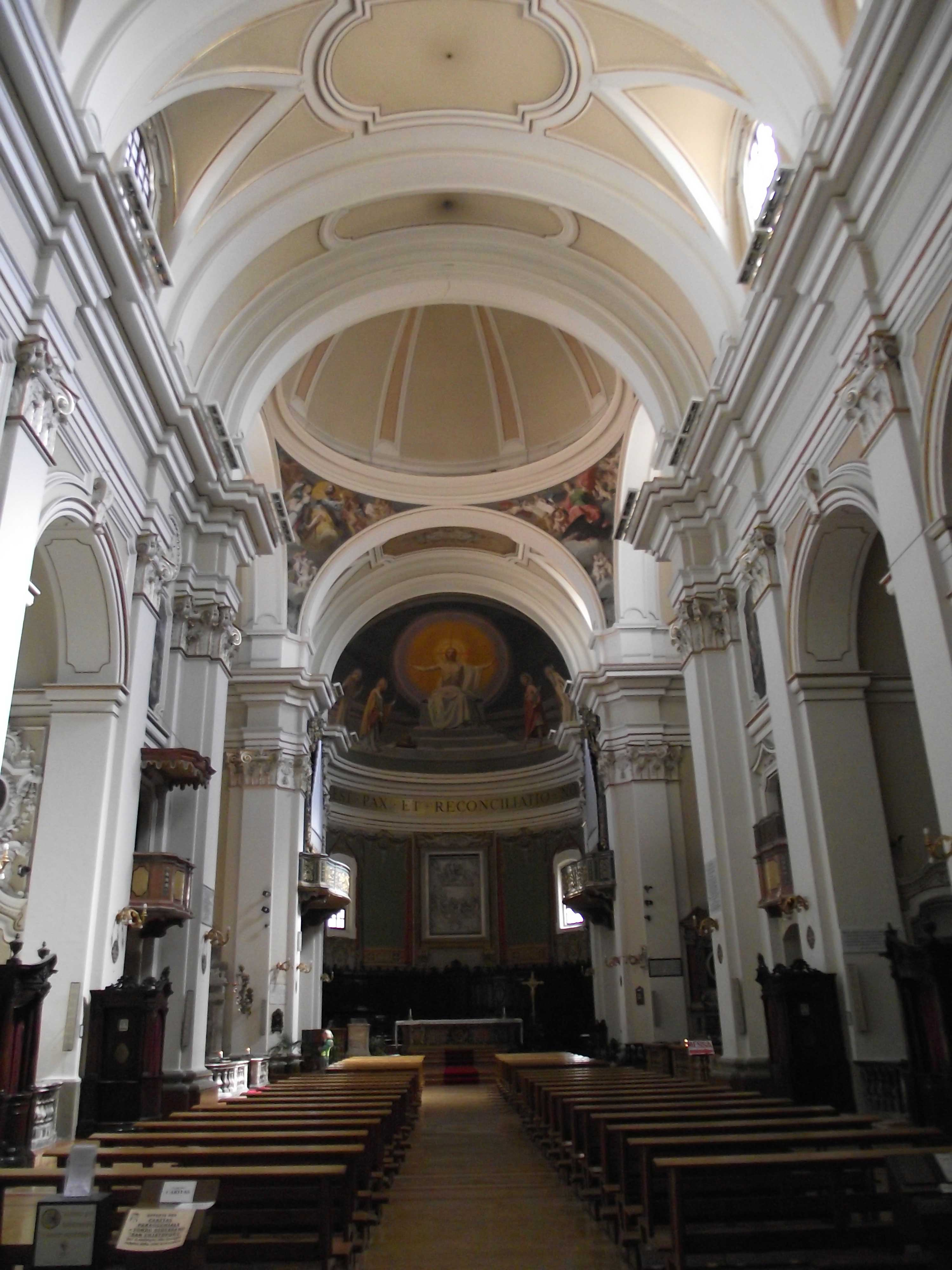 Jesi, Duomo di San Settimio